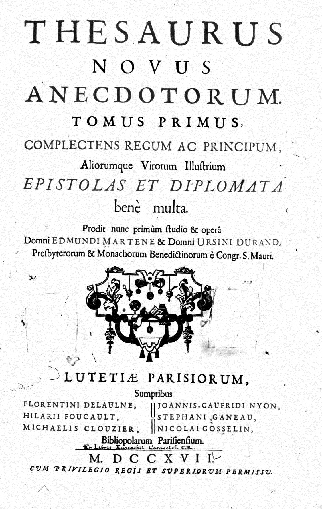 Frontespizio